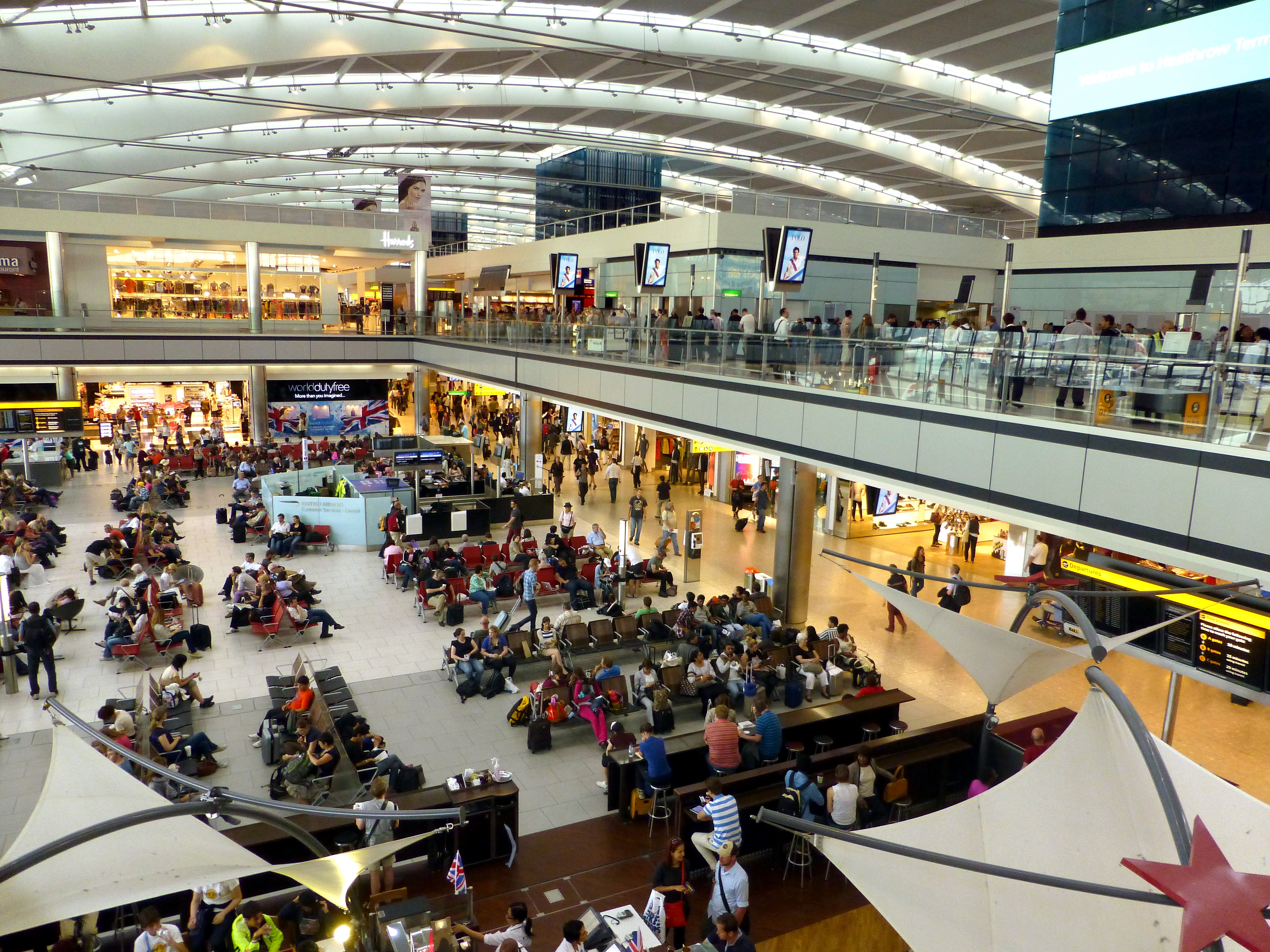 Le Terminal 5 de l'aéroport de Heathrow.